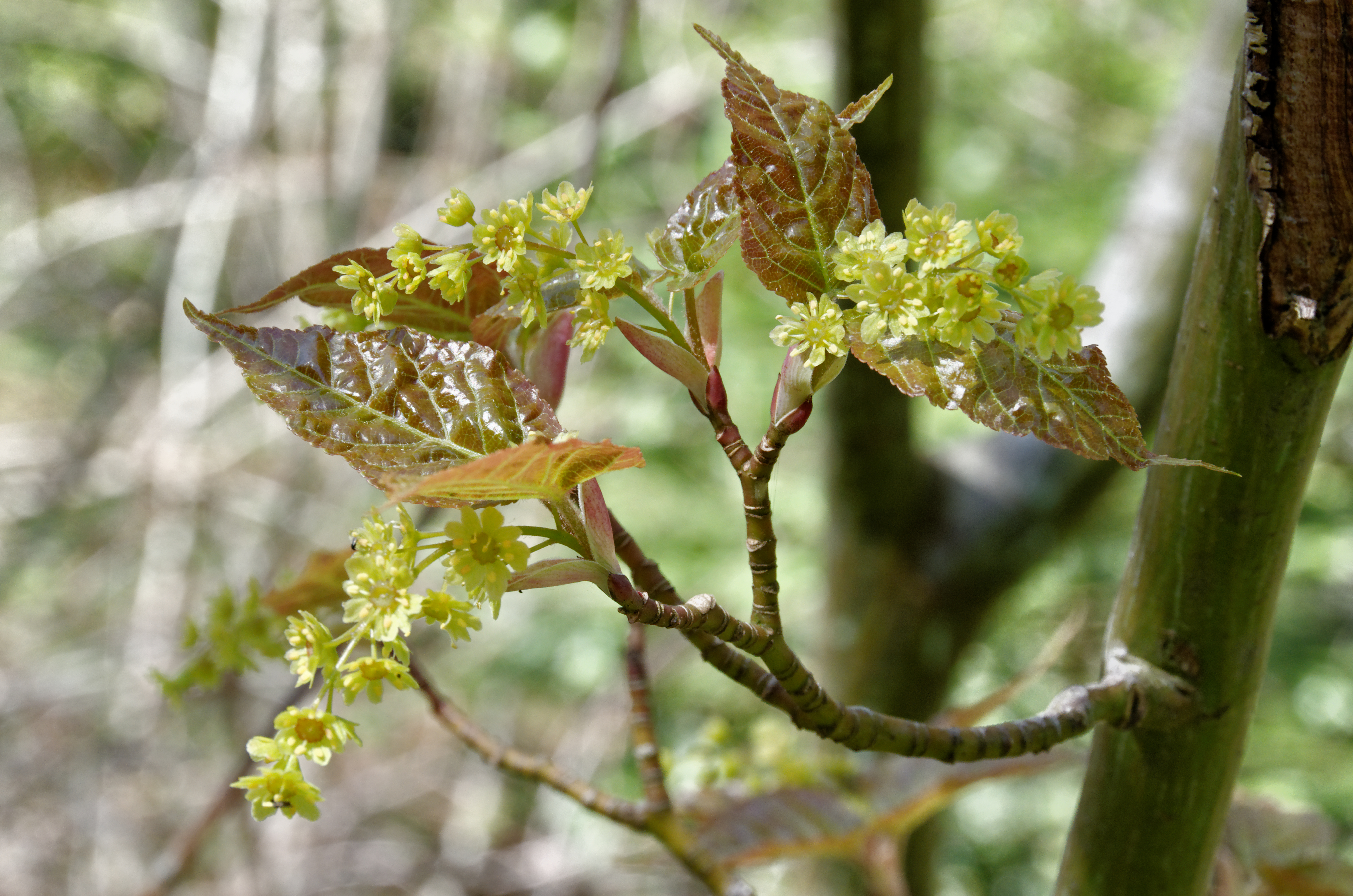 Acer davidii Franch - Érable du père David. Originaire de Chine. Jeunes feuilles et inflorescences photogaphiées à l'arboretum de Pézanin, Dompierre-les-Ormes (France)